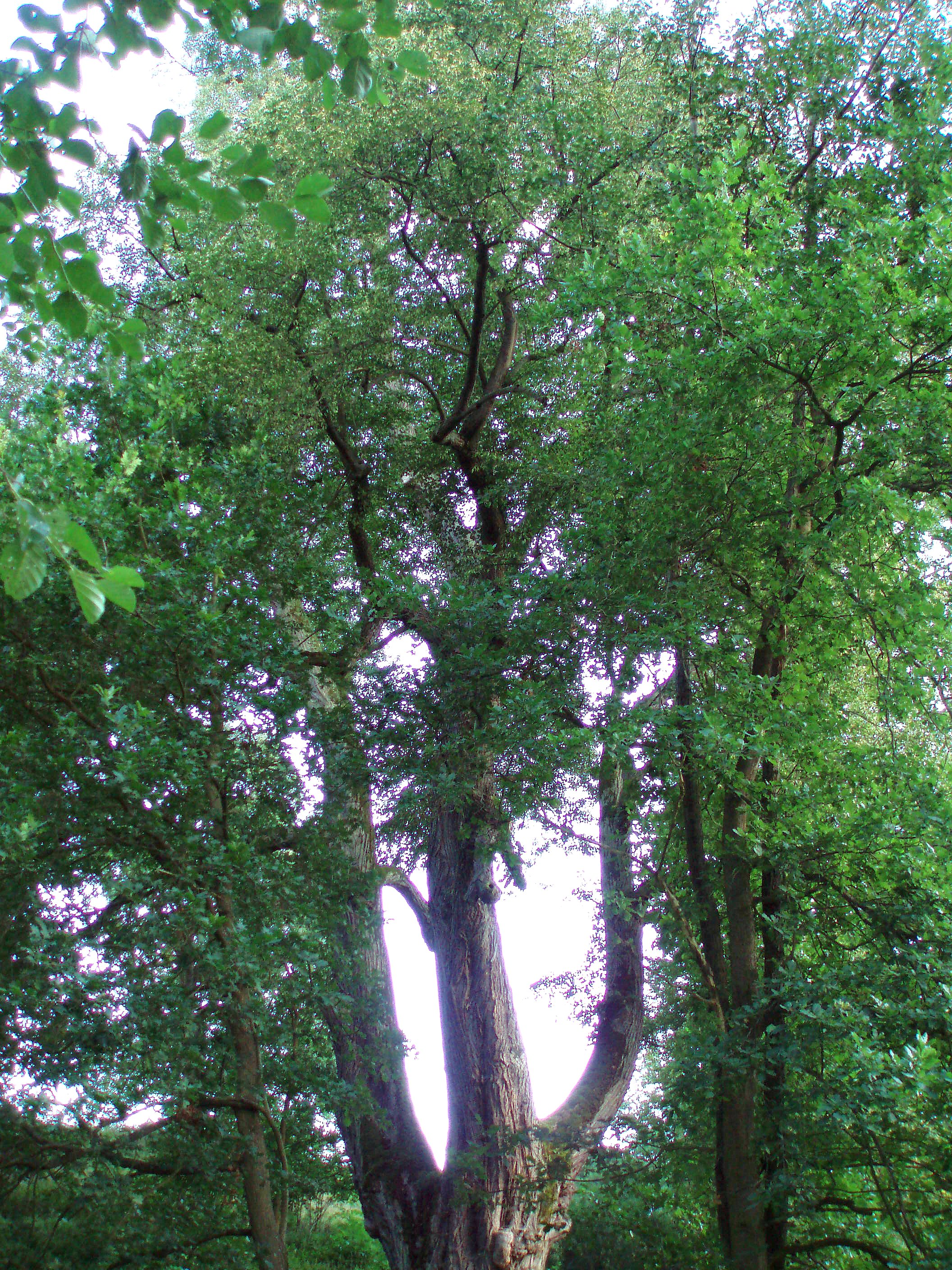 Topol bílý na Pozorce